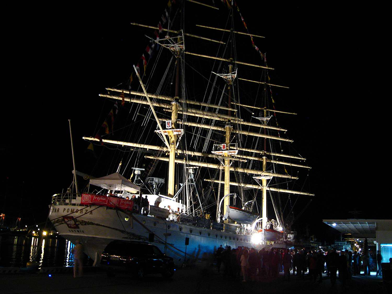 Wyjazdowe wydanie Listy Przebojów Programu Trzeciego, z Daru Pomorza w Gdyni. Notowanie nr 1544, 2 września 2011, audycję prowadził Marek Niedźwiecki